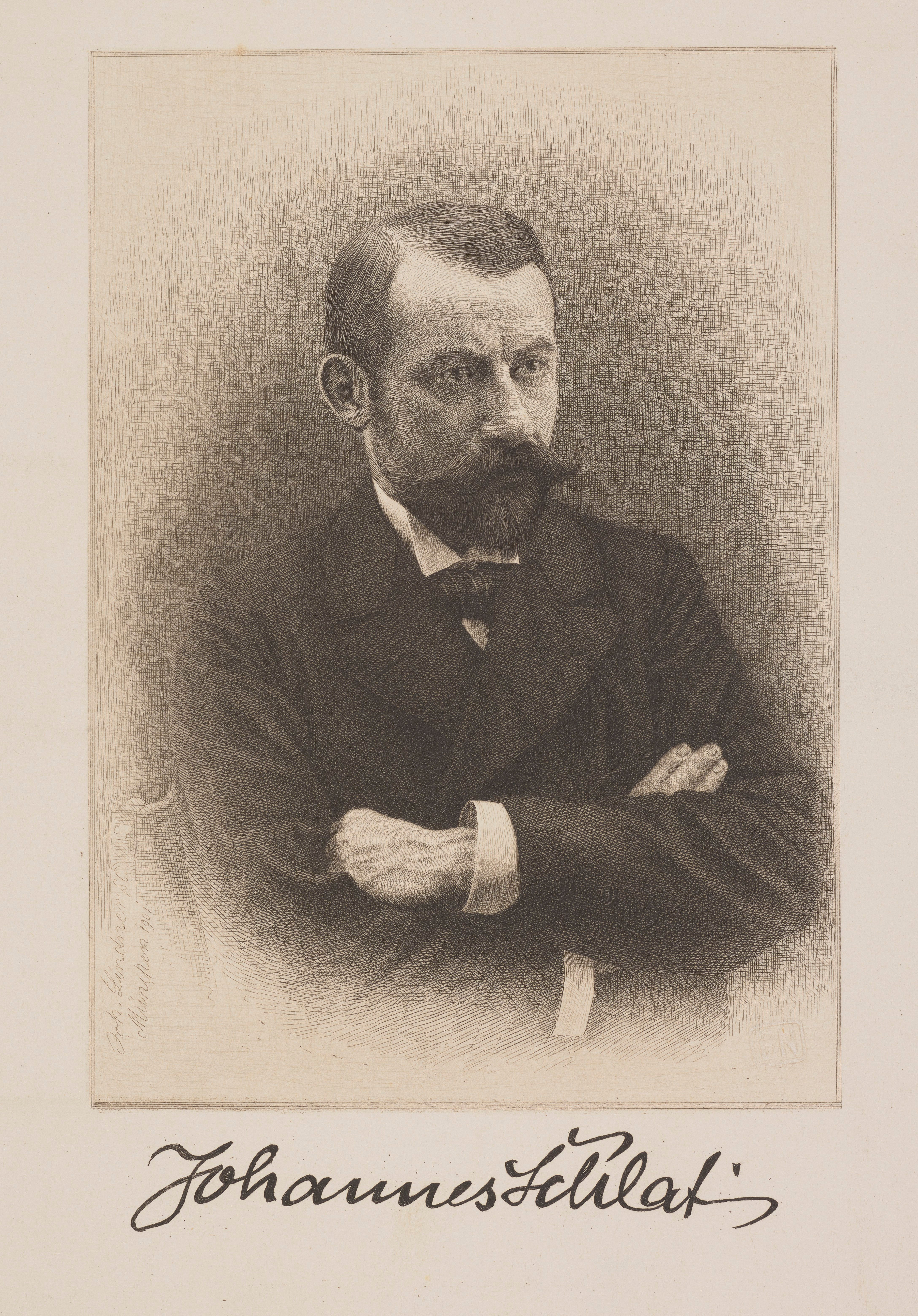 Johannes Schlaf